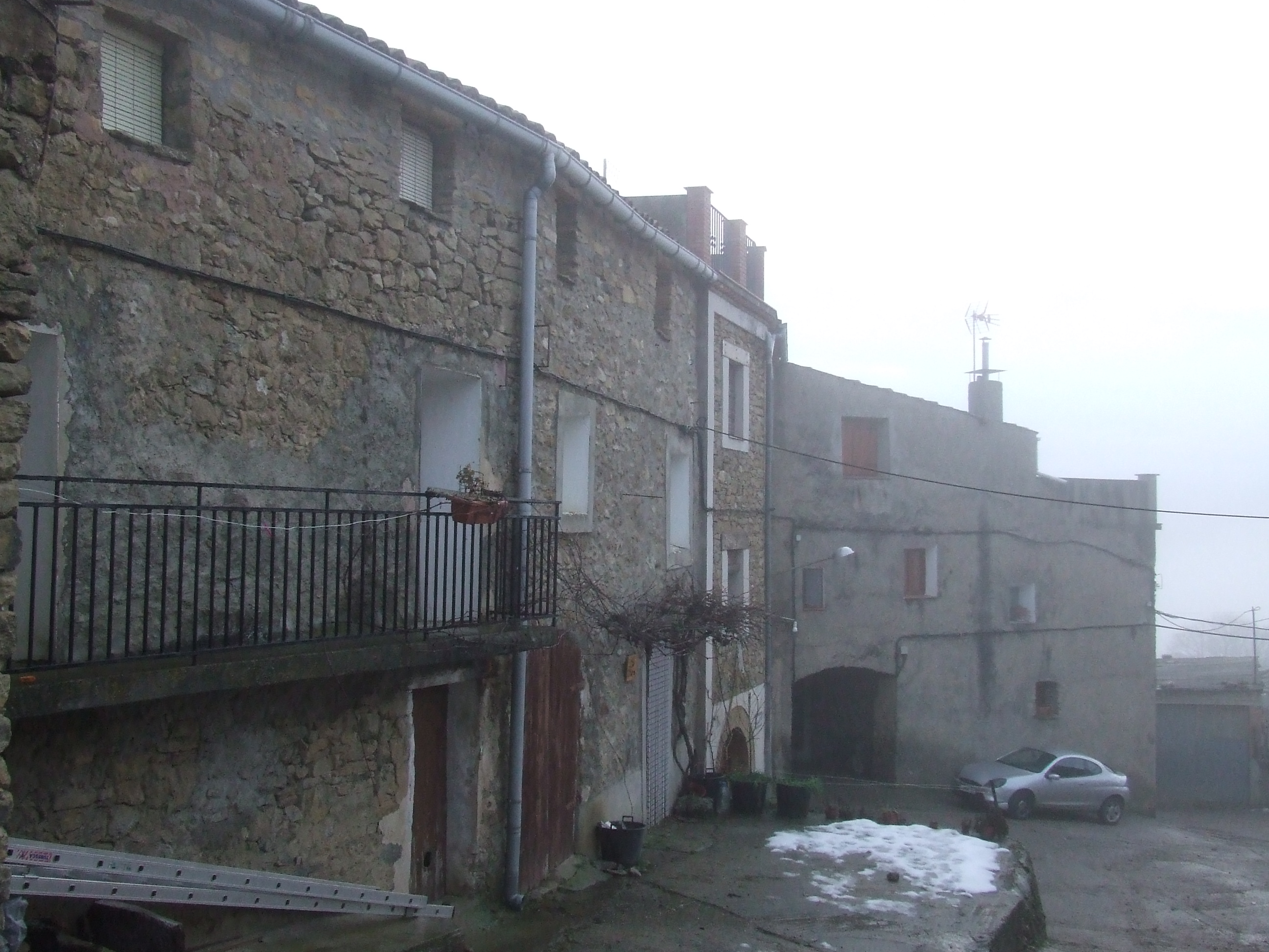 El poble clos d'Aransís (Gavet de la Conca, Pallars Jussà)